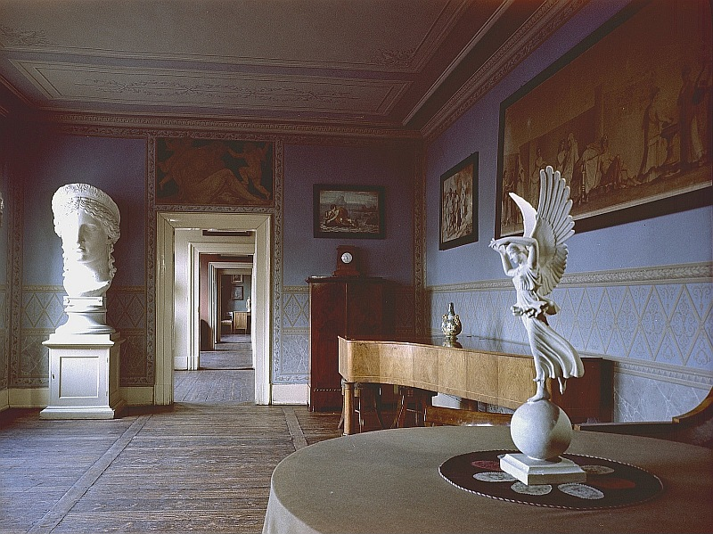 Original image description from the Deutsche Fotothek Weimar. Goethes Wohnhaus, Junozimmer